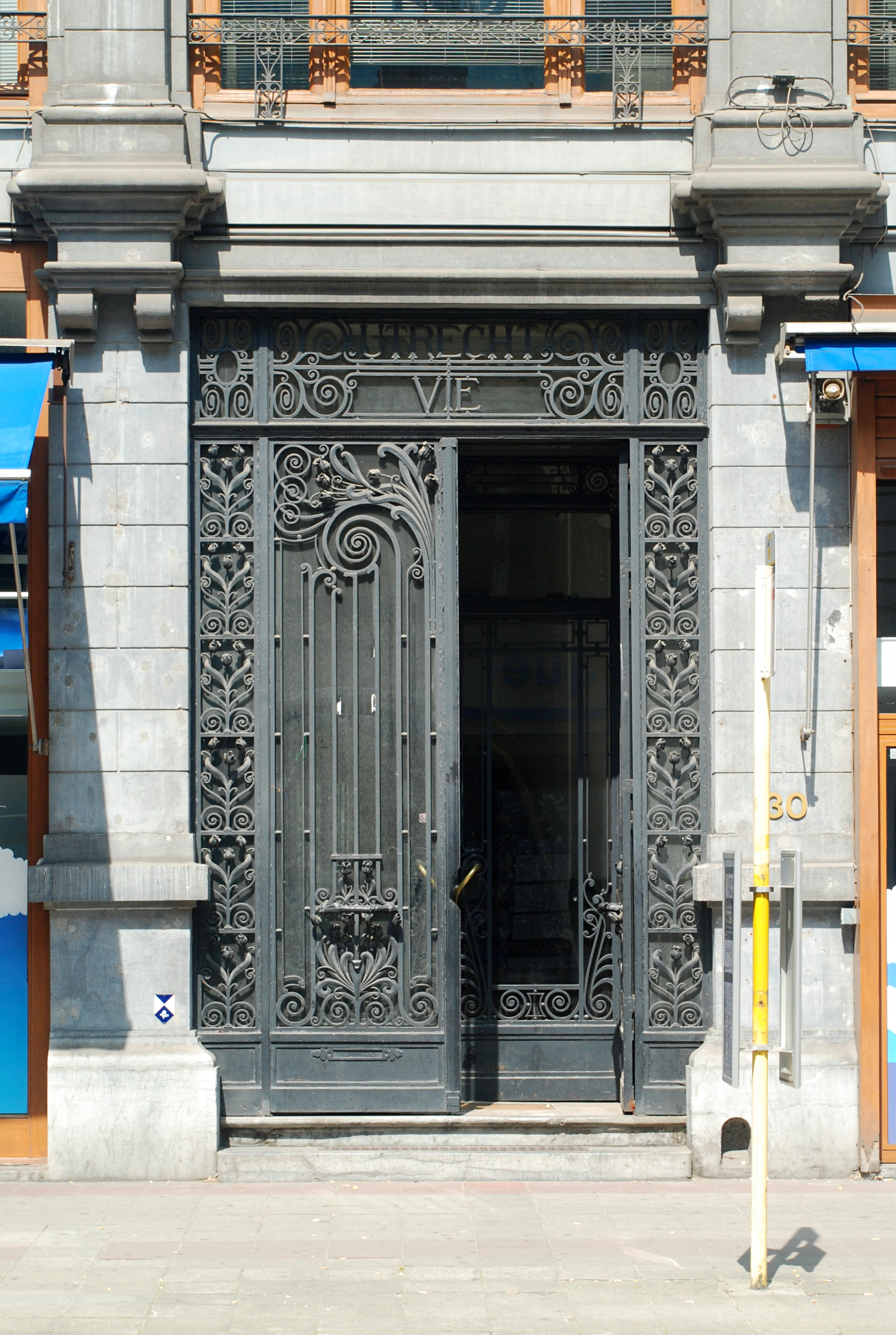 Belgique - Bruxelles - Immeuble « Le Printemps »